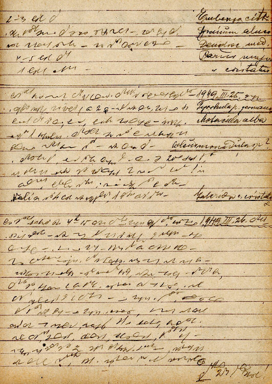 Breuer György gyorsírásos jegyzeteiből